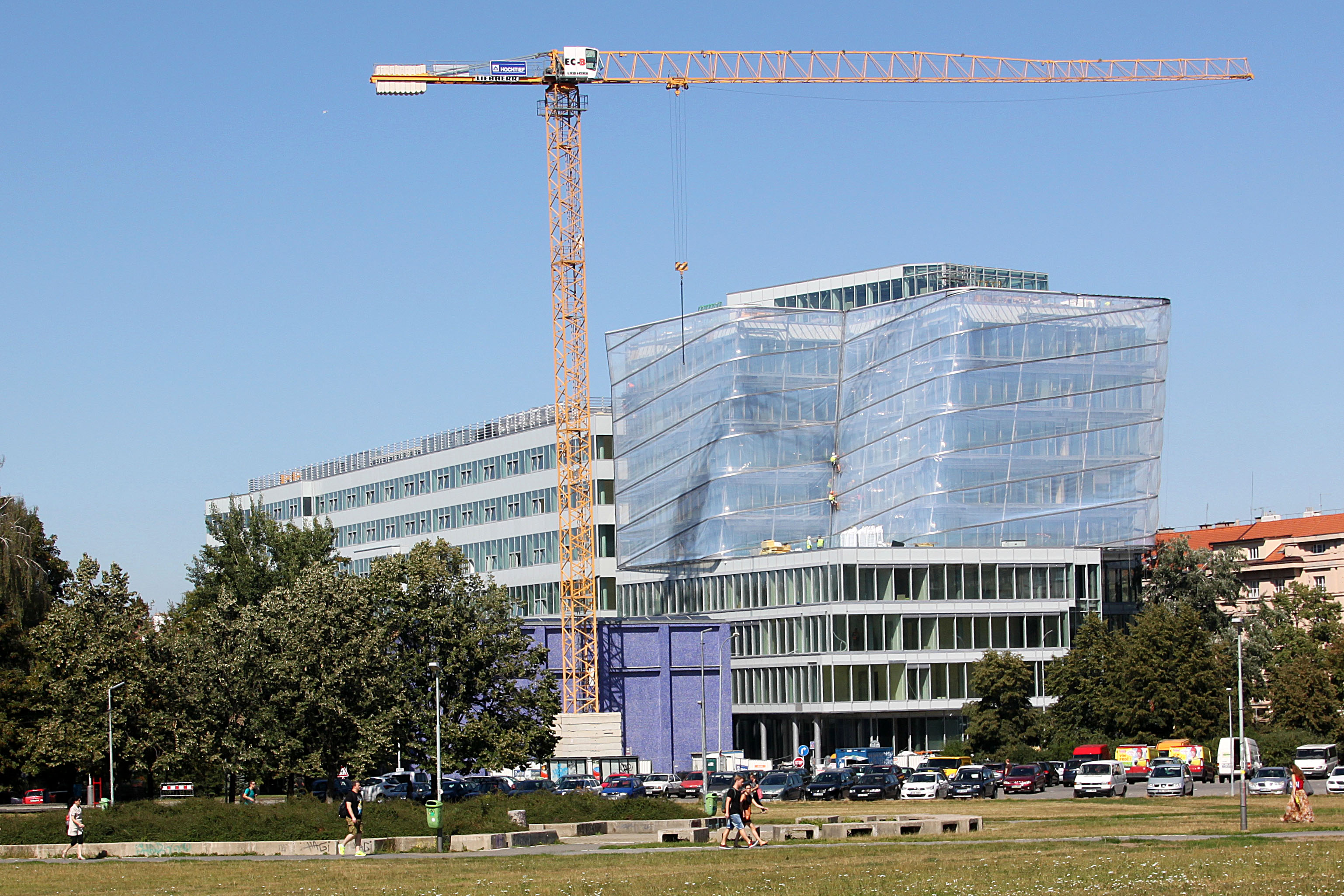 Nová budova ČIIRK v dejvickém kampusu